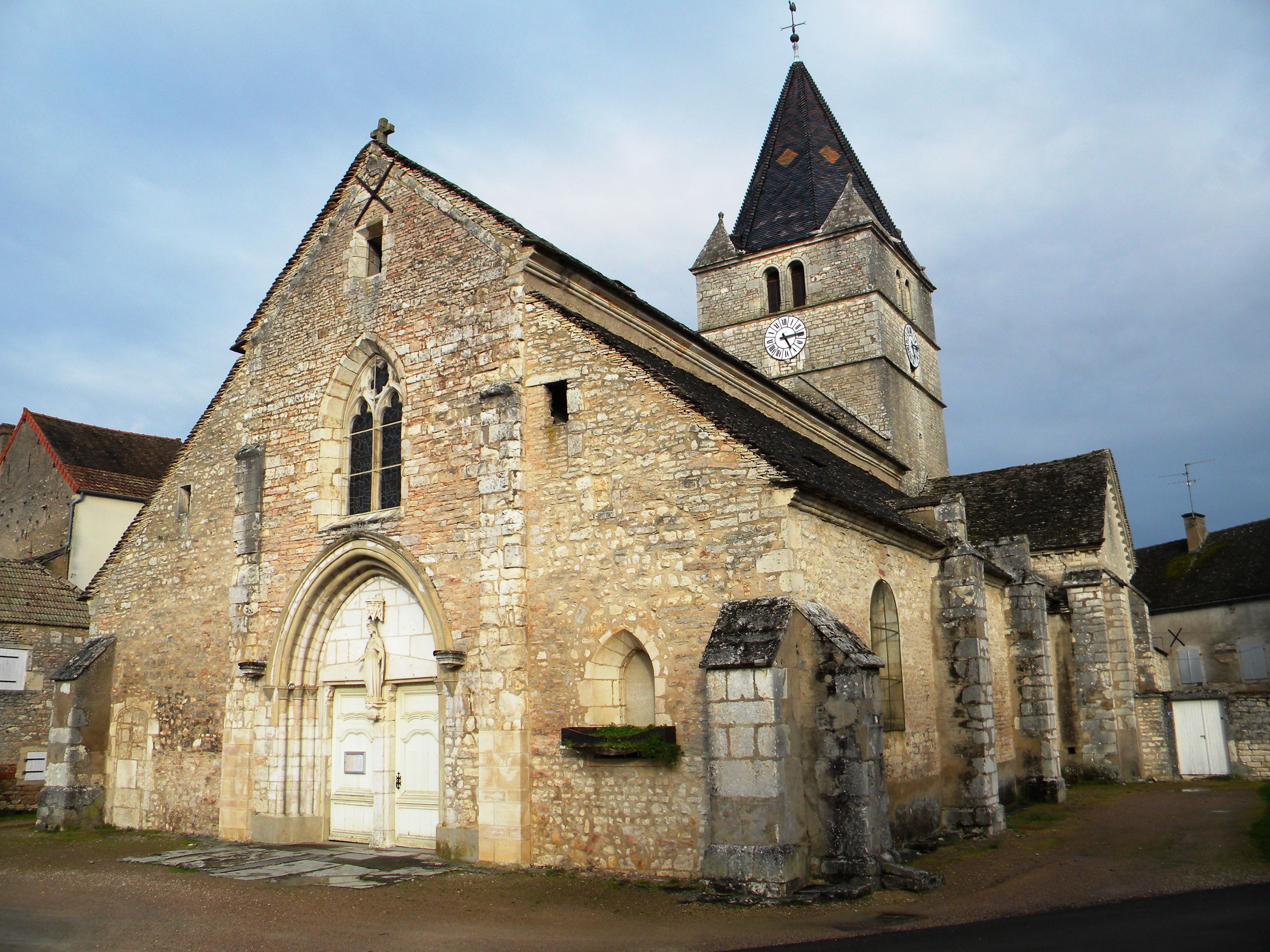 Preĝejo